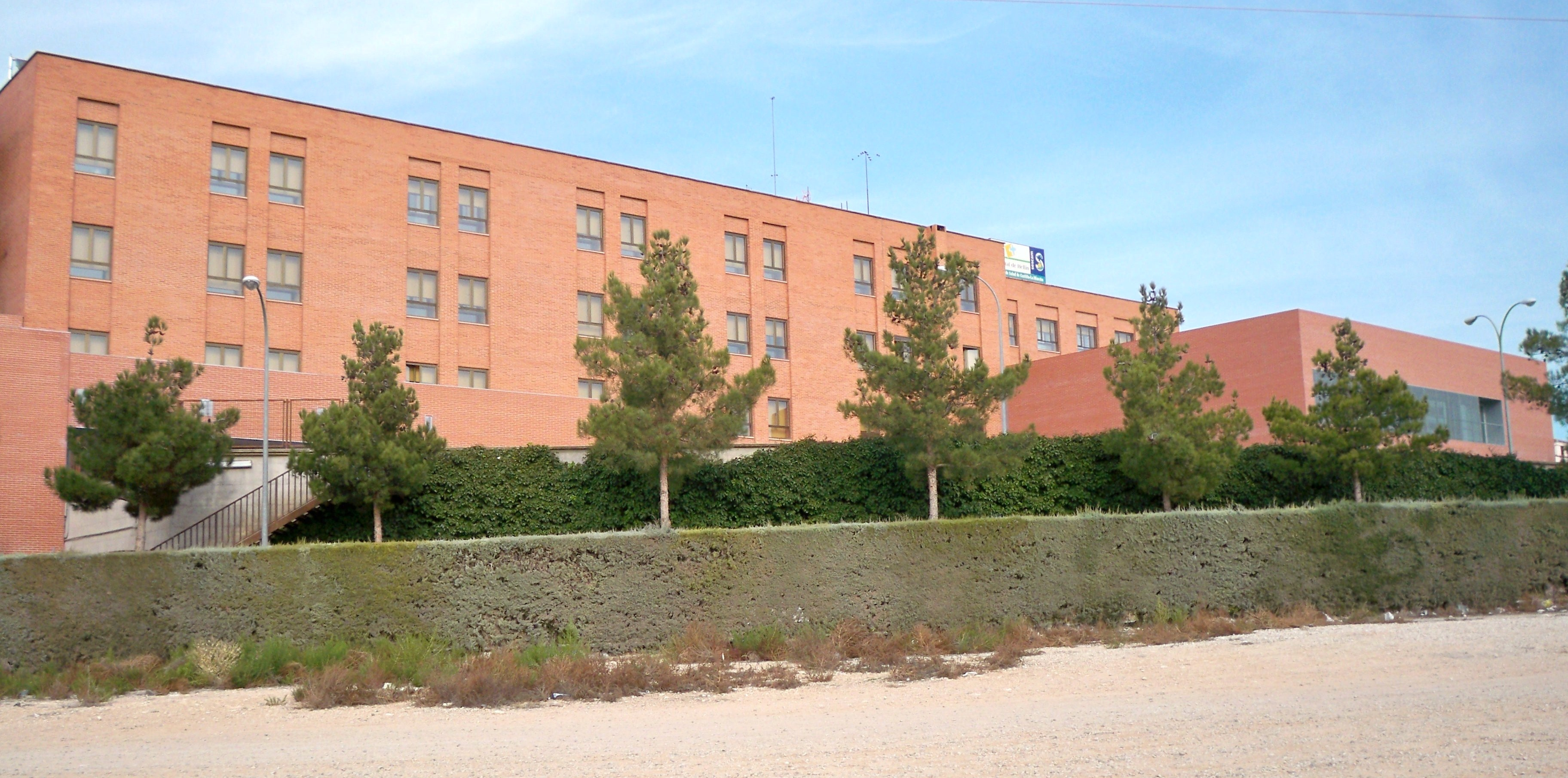 Vista lateral del Hospital Comarcal de Hellín (Albacete- España), pertenciente al Servico de Salud de Castilla-La Mancha.